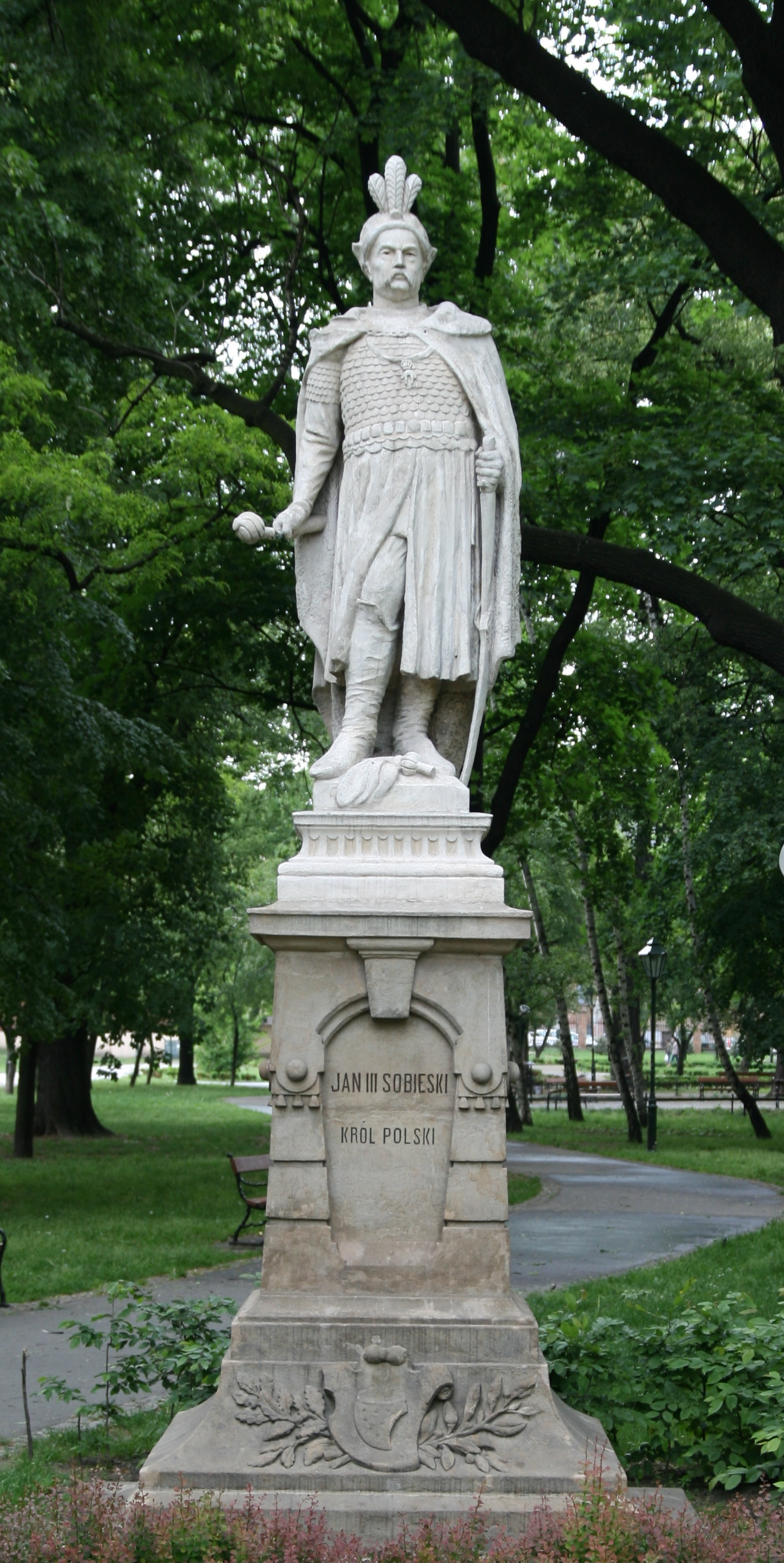 Jan III Sobieski, rzeźba Walerego Gadomskiego, Park Strzelecki w Krakowie